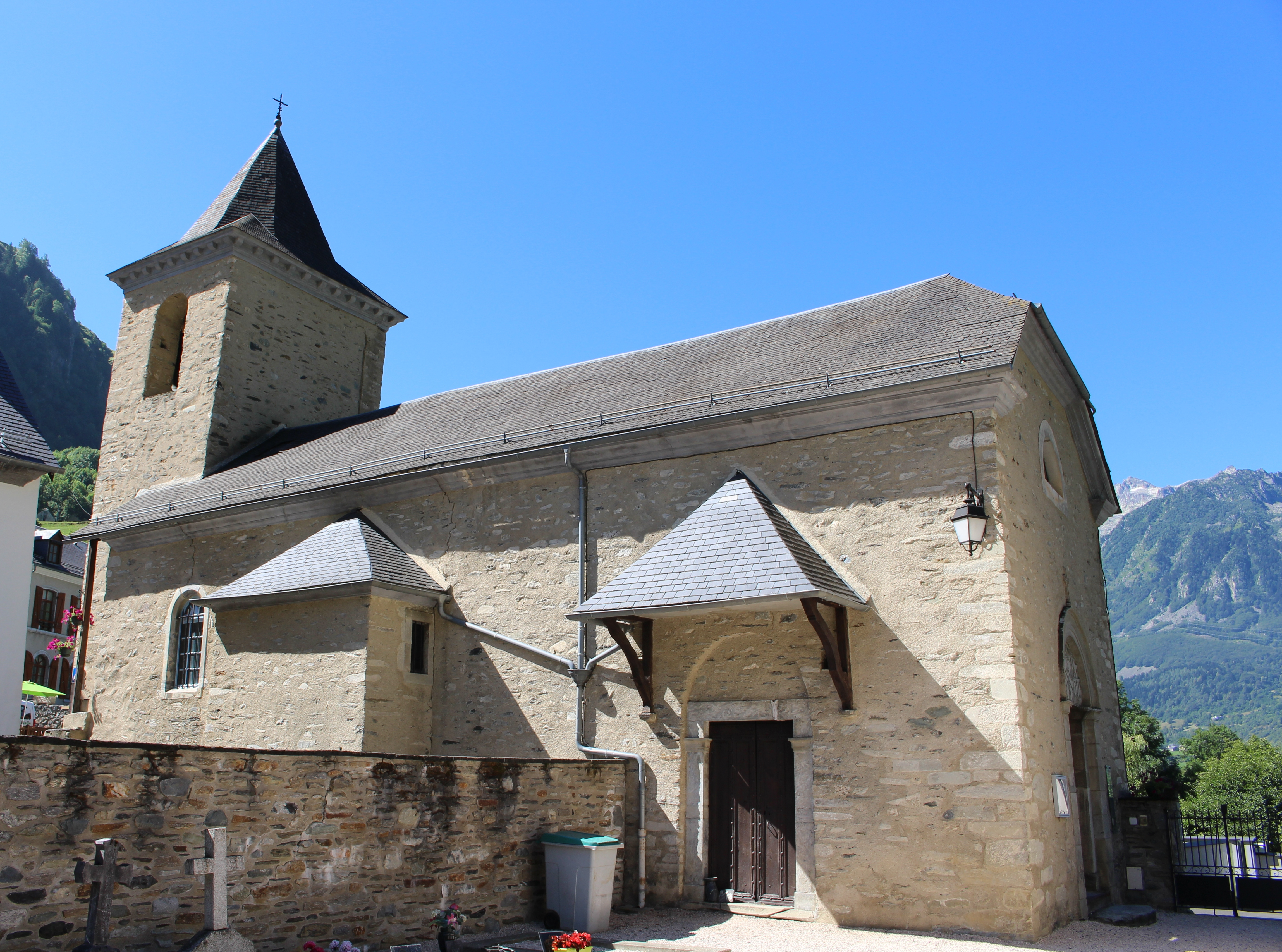 Église Saint-Michel de Viella (Hautes-Pyrénées)